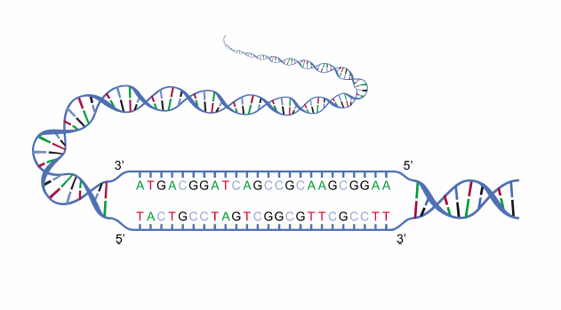 DNA, strands